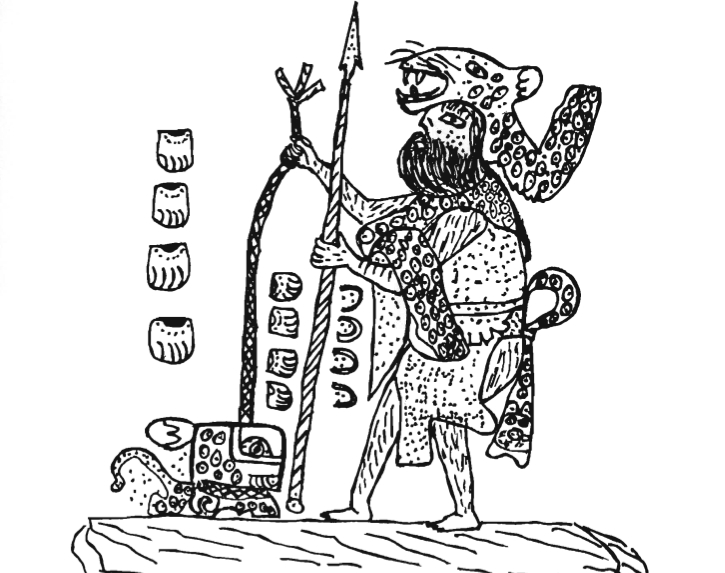 Yuntsil Balam, der Jaguar-Gott der Maya. Zeichnerische Darstellung der mythologischen Vorstellung. Geringe Schöpfungshöhe als wissenschaftliche Darstellung